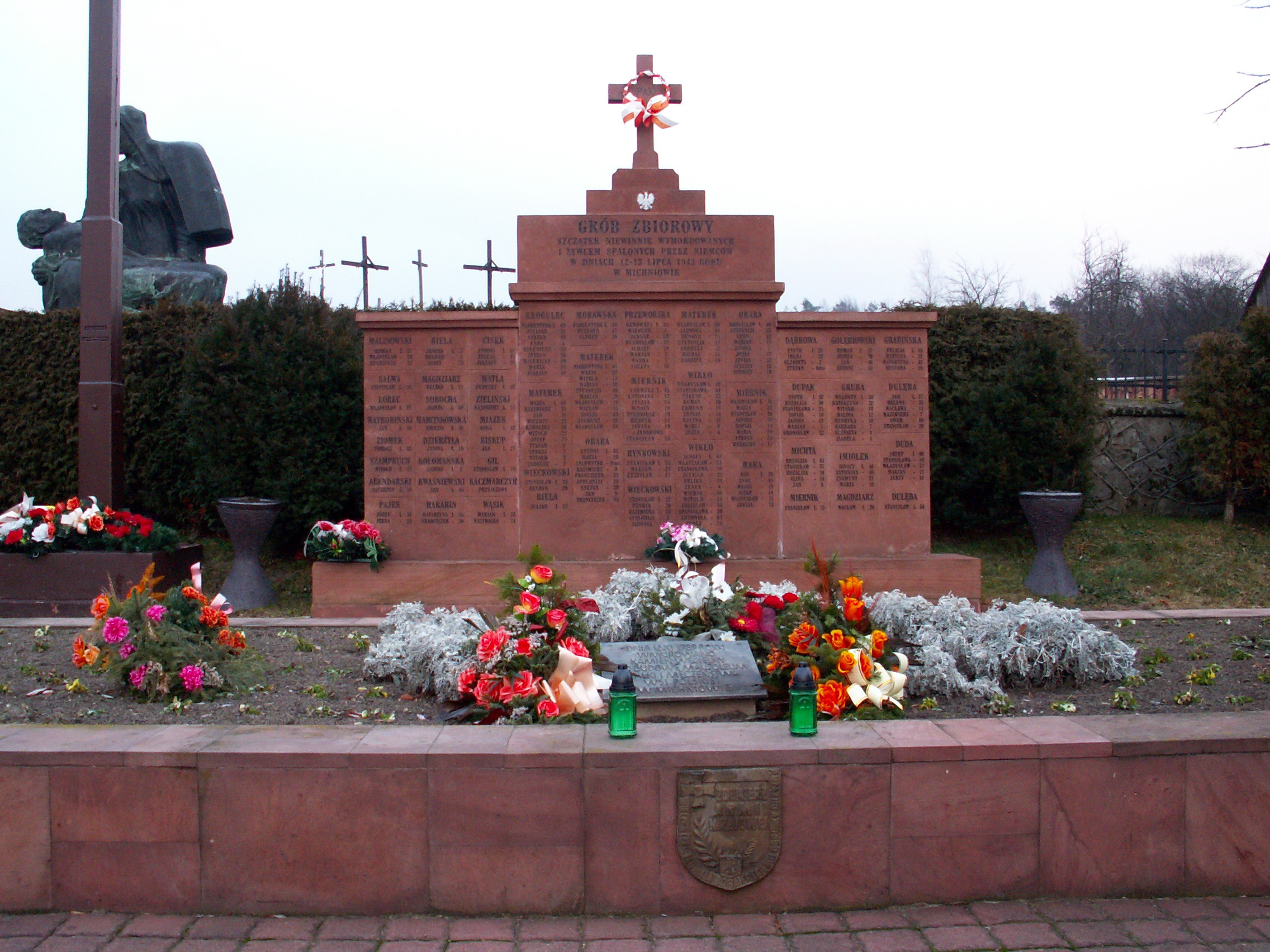 Mausoleum in Michniów, Poland